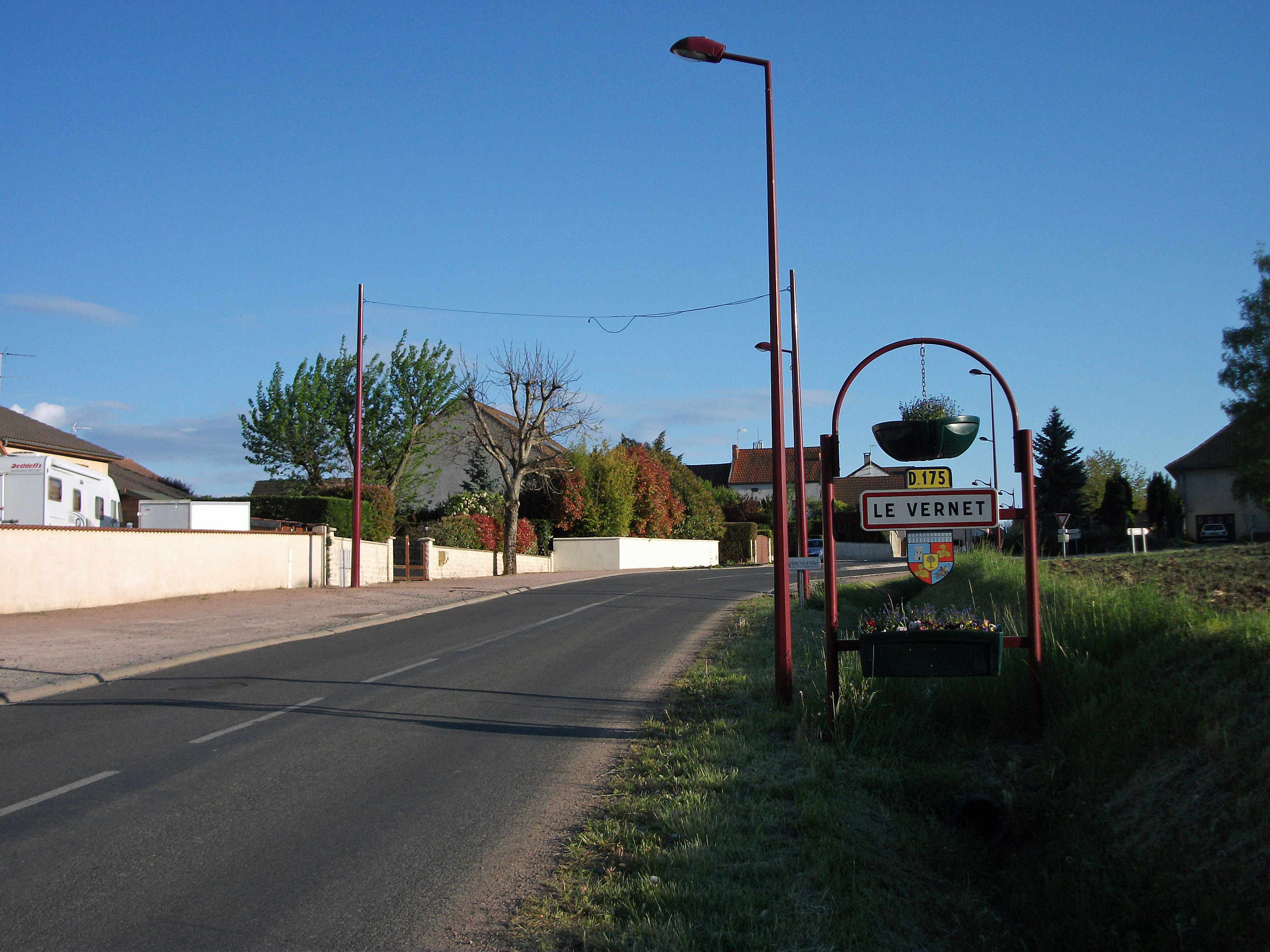 Entrée du Vernet depuis Cusset par la D 175